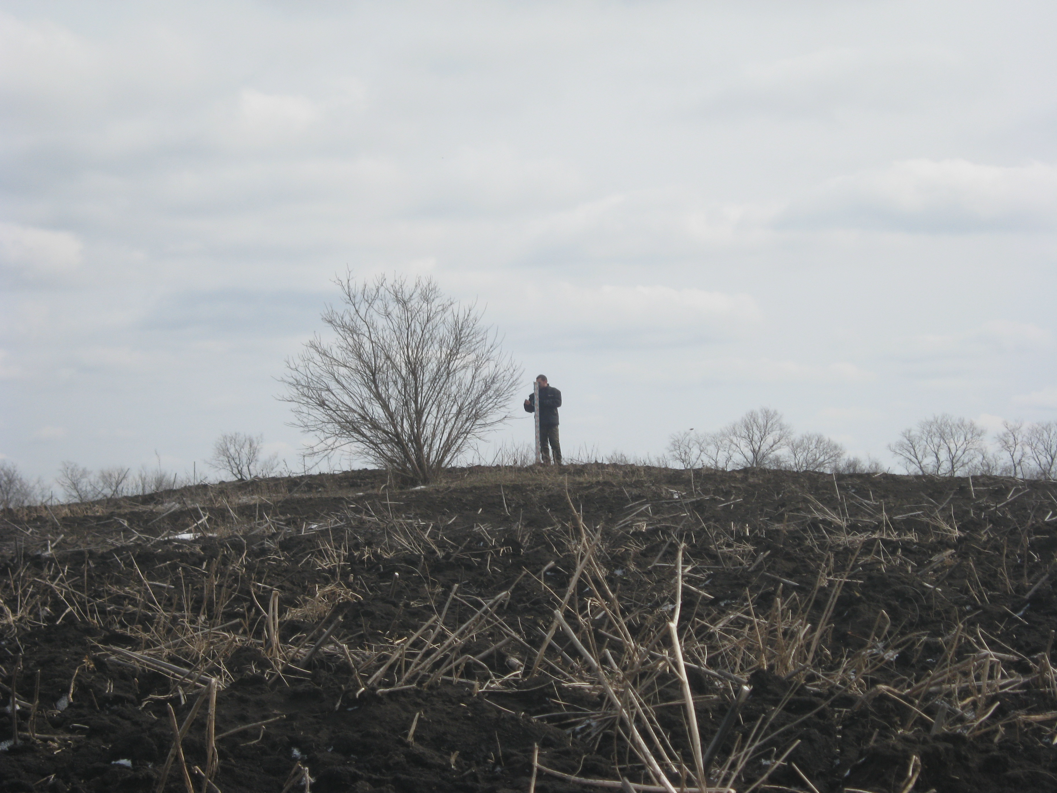 Кургани. 8., Семенівка